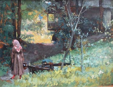 Nel bosco, olio su tavola, 22 x 28,5 cm., coll. privata